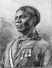 Tirailleur de race bambara (illustration de Côte occidentale d'Afrique du Colonel Frey, fig. 52, p. 90)